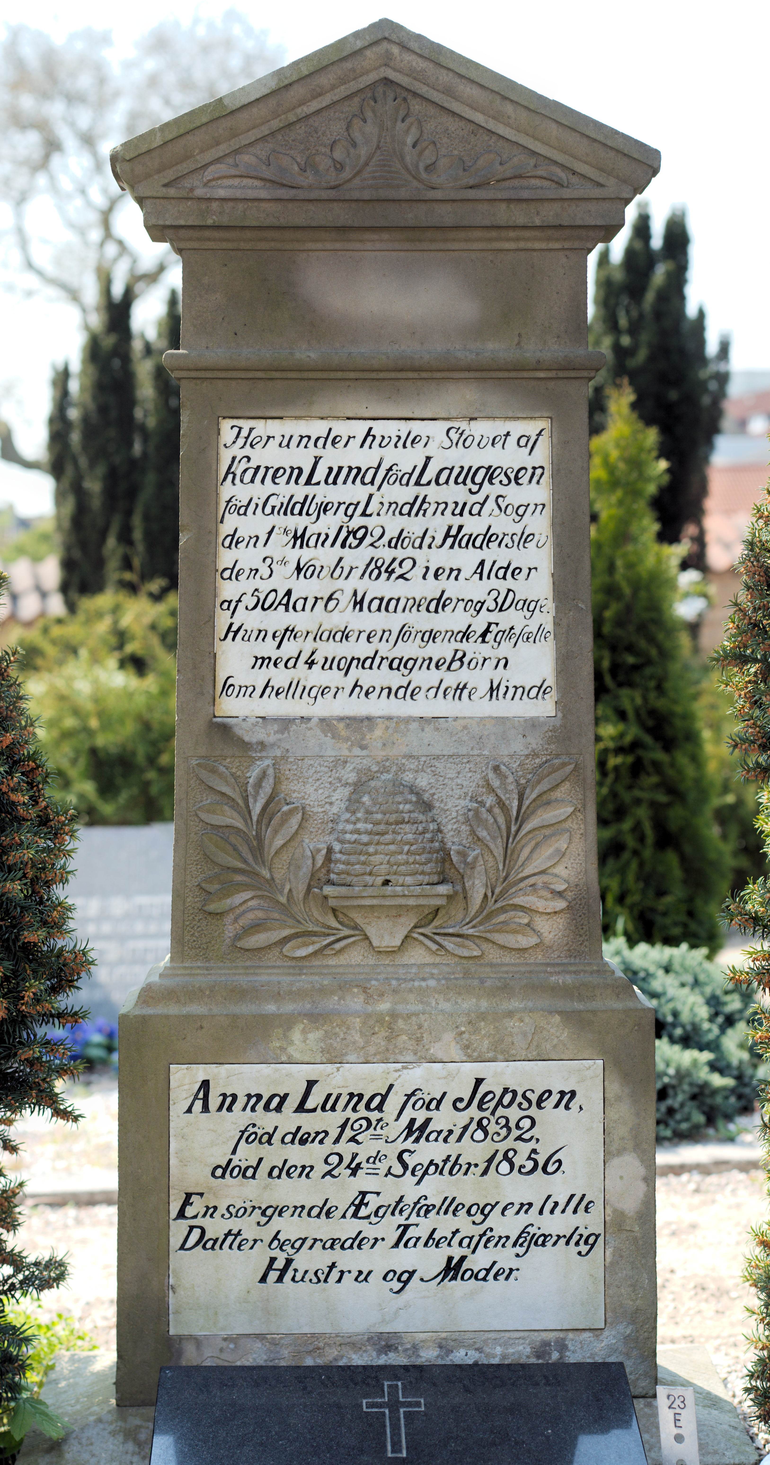 Karen Lunds gravsten på Sankt Severin Kirke and info